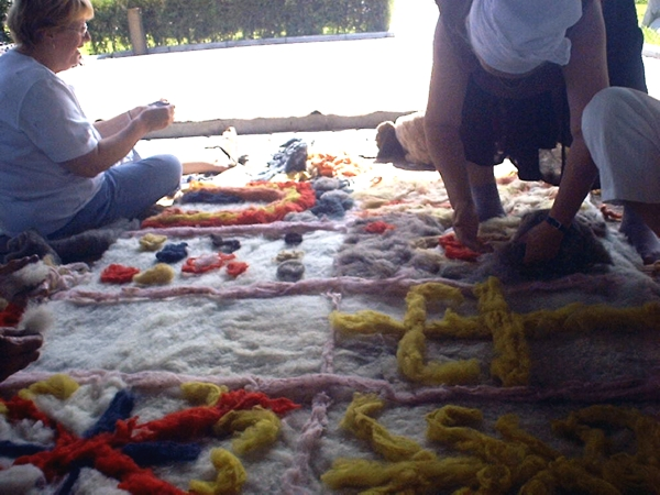 making of Ala kiyiz, a tourist attraction in Kyrgyzystan